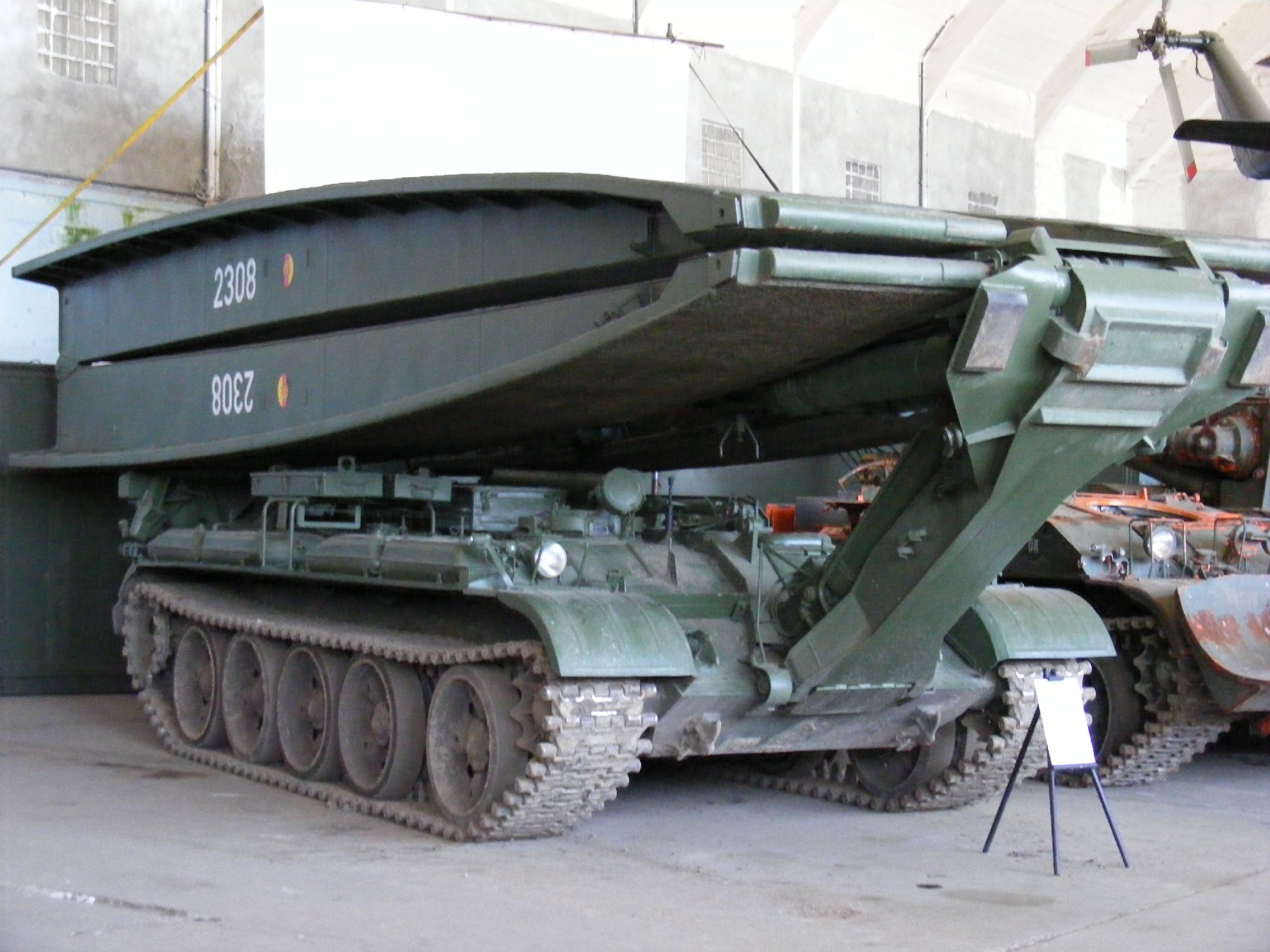 BLG-60 M2 im Technik-Museum Pütnitz.